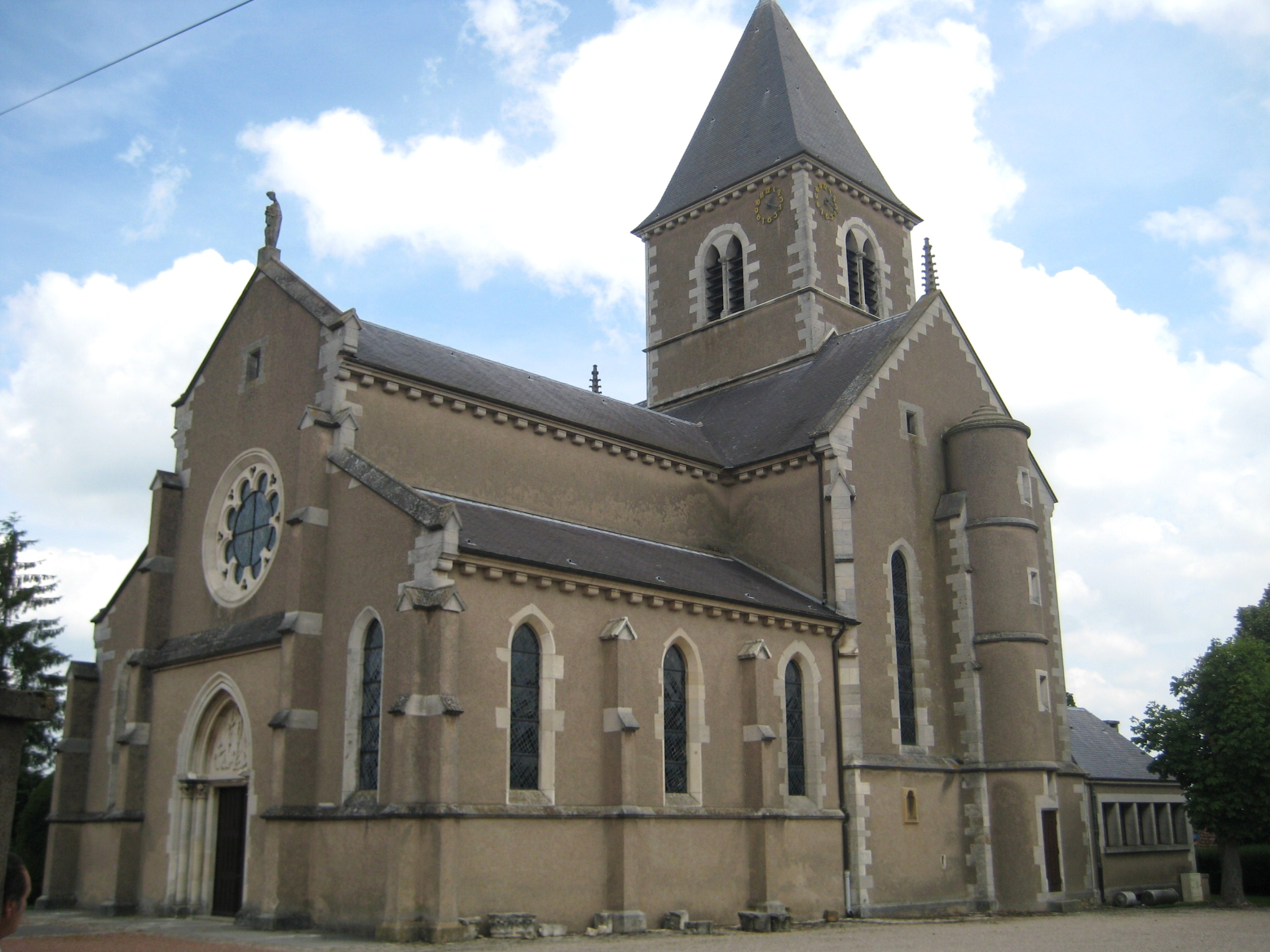 Description Église de Cheminot Date25 June 2009Sourcemon appareil photoAuthorAimelaime Église de Cheminot